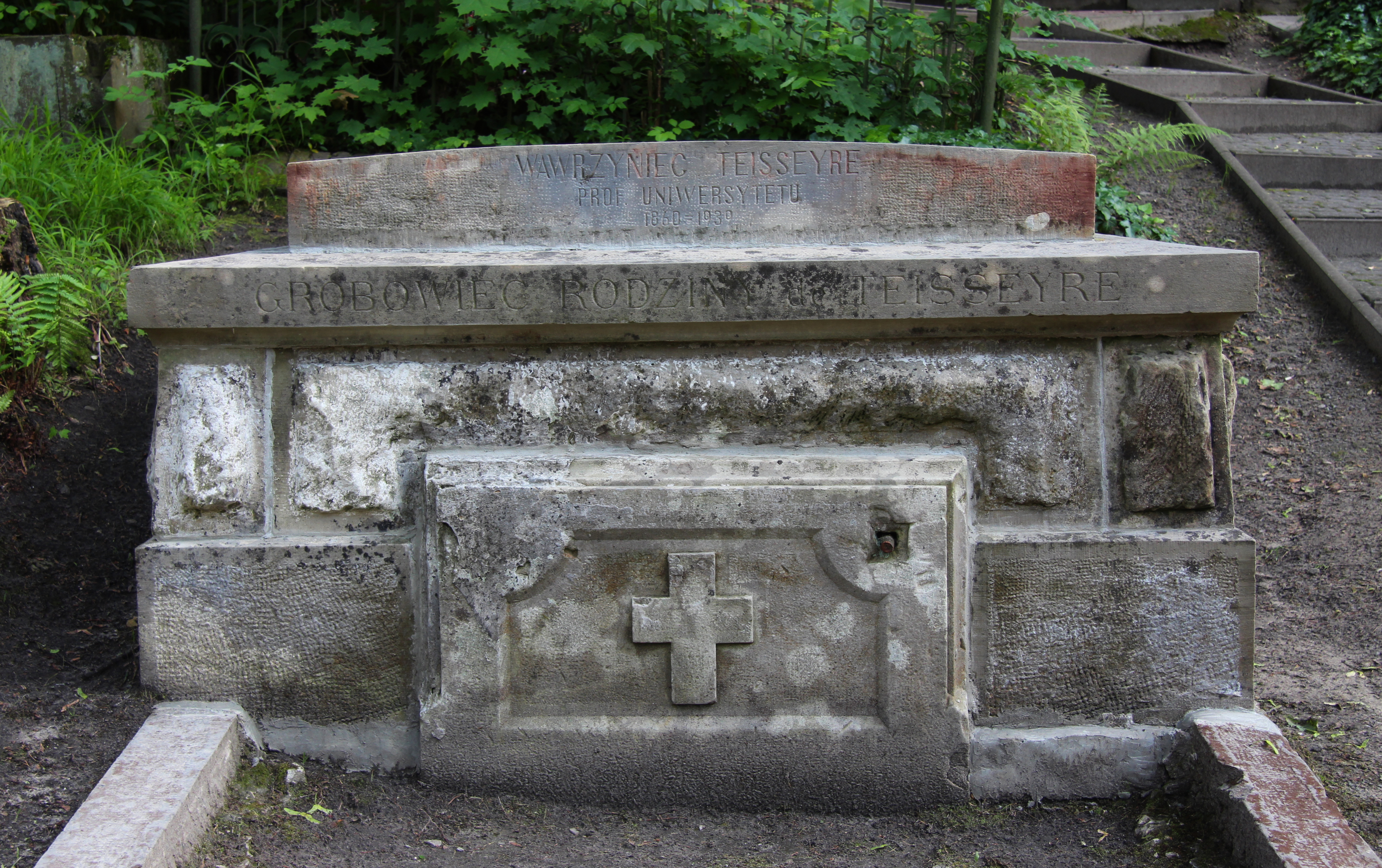 Grobowiec rodziny Teisseyrów na cmentarzy Łyczakowskim we Lwowie